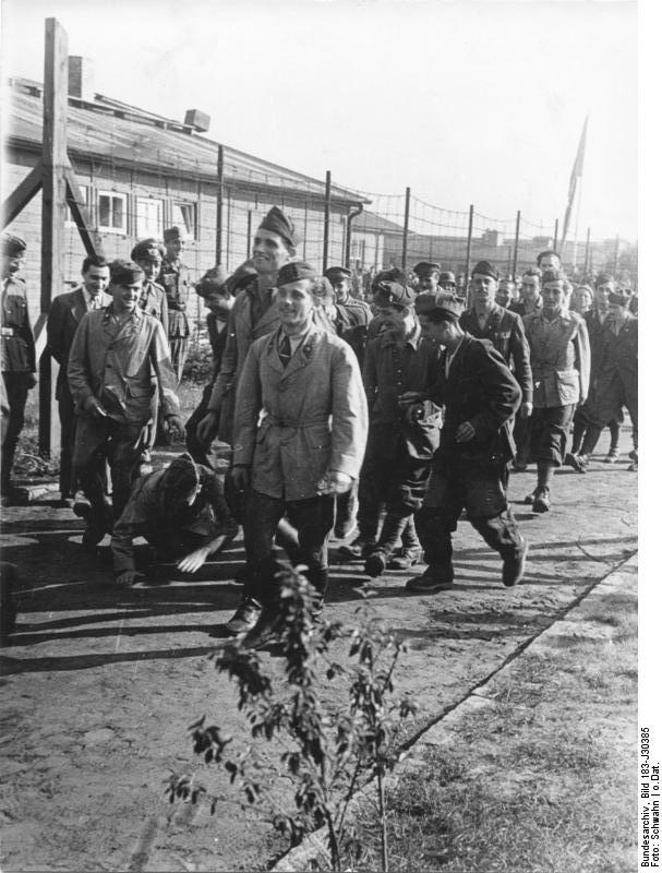 Überführung italienischer Kriegsinternierter in das Zivilarbeitsverhältni. In einem Lager in Berlin. UBz.: Der erste Spaziergang ins Freie. Nach dem Abzug der Wehrmachtwache wurde das Lagertor entfernt. Die ehemaligen Kriegsinternierten in die Obhut der deutschen Arbeitsfront überführt, geniessen jetzt alle Rechte und Behandlung wie freie ausländische Zivilarbeitskräfte. 20.8.44 Information added by Wikimedia users. *